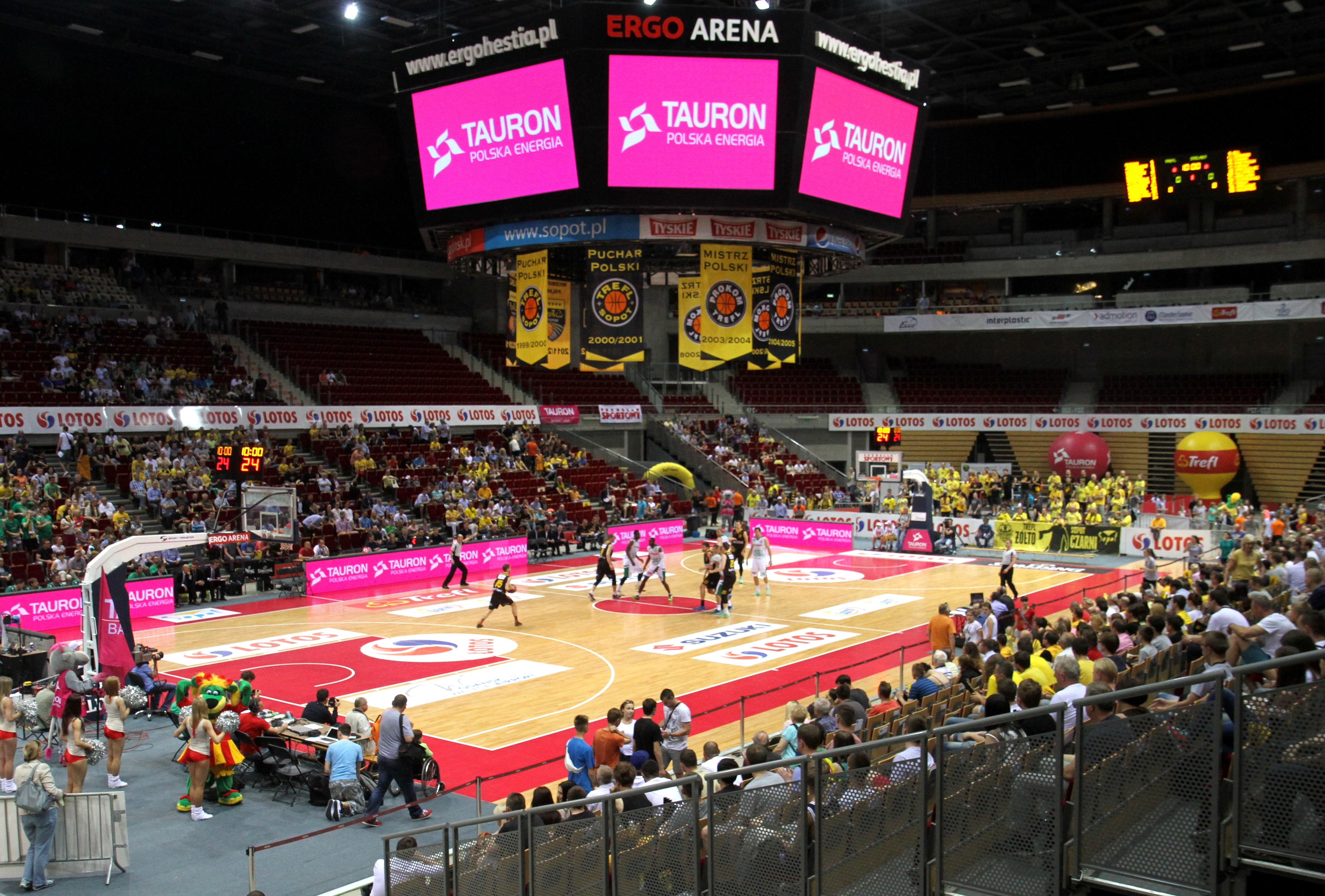 ERGO Arena podczas meczu Tauron Basket Ligi